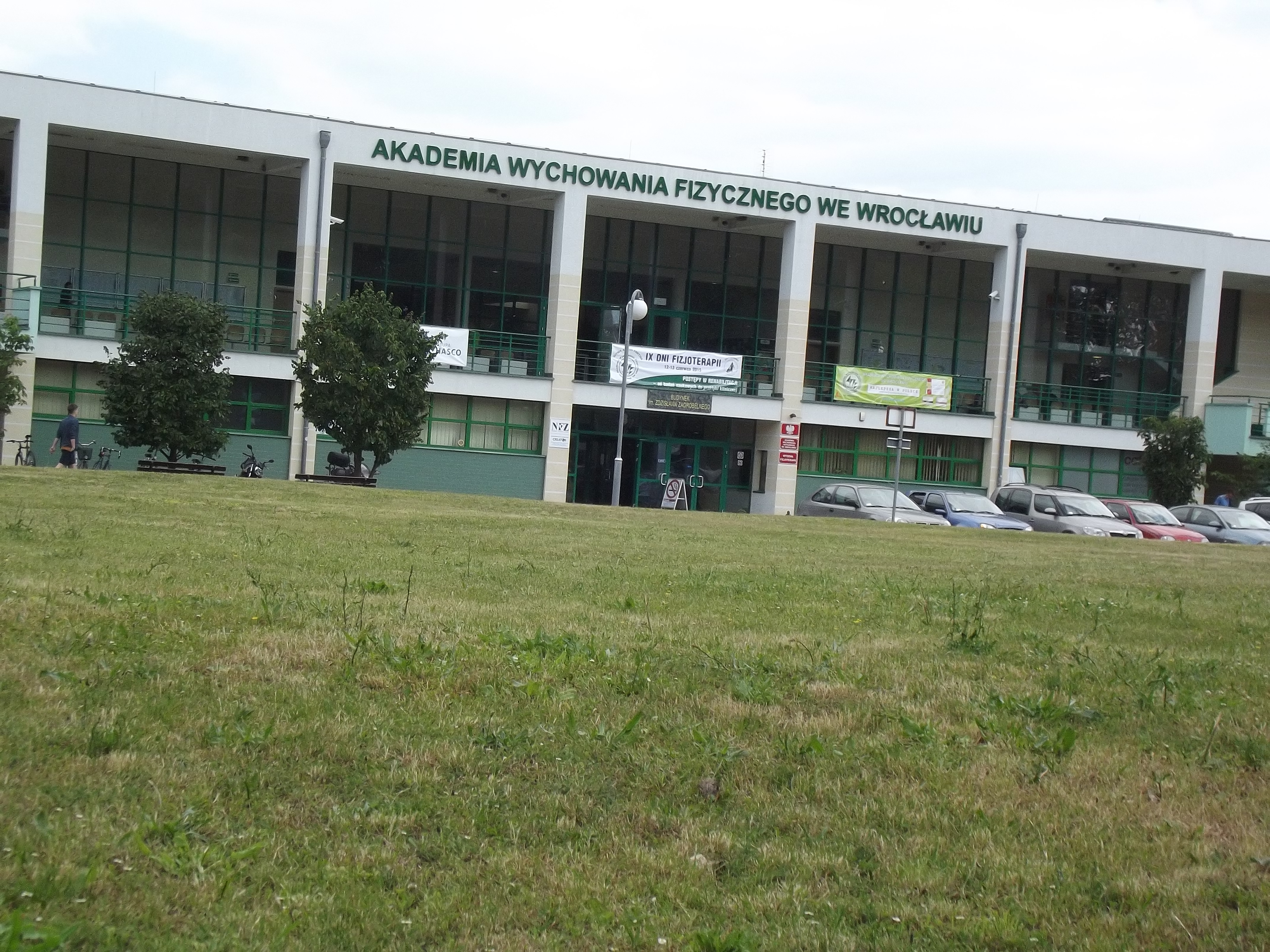 Akademia Wychowania Fizycznego - Wydział Fizjoterapii